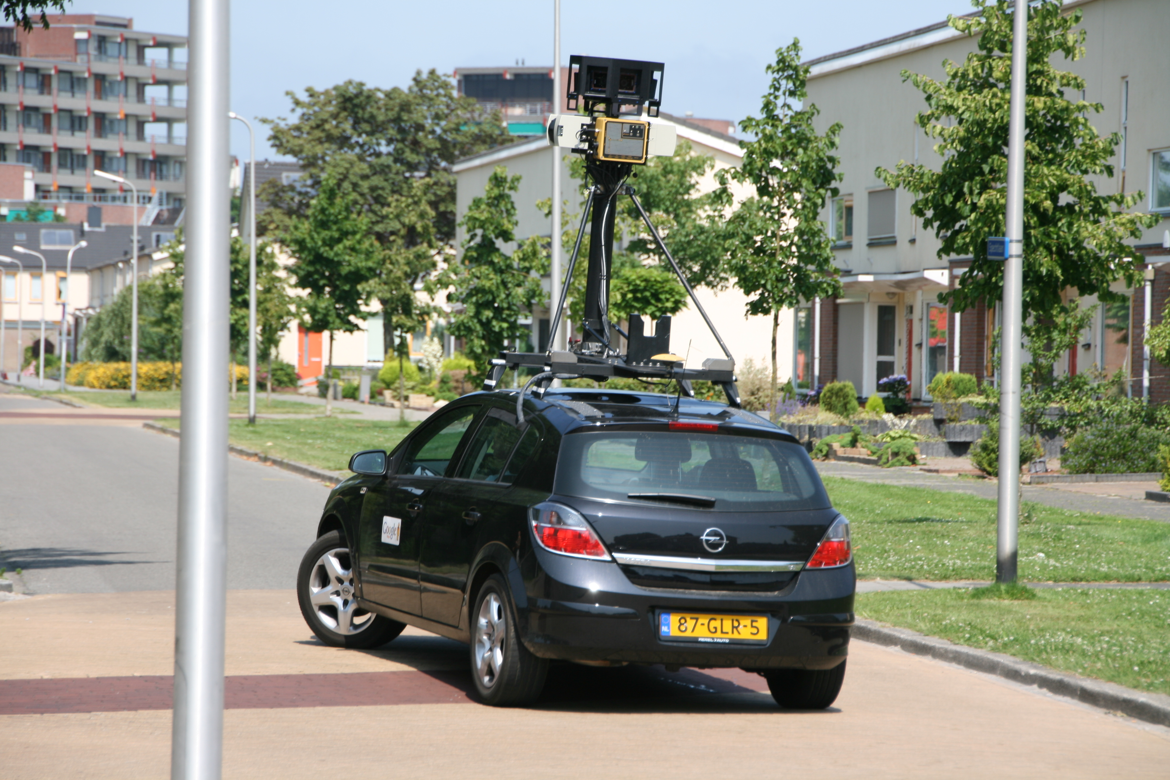 Google Street View in Hoogeveen (Drenthe)